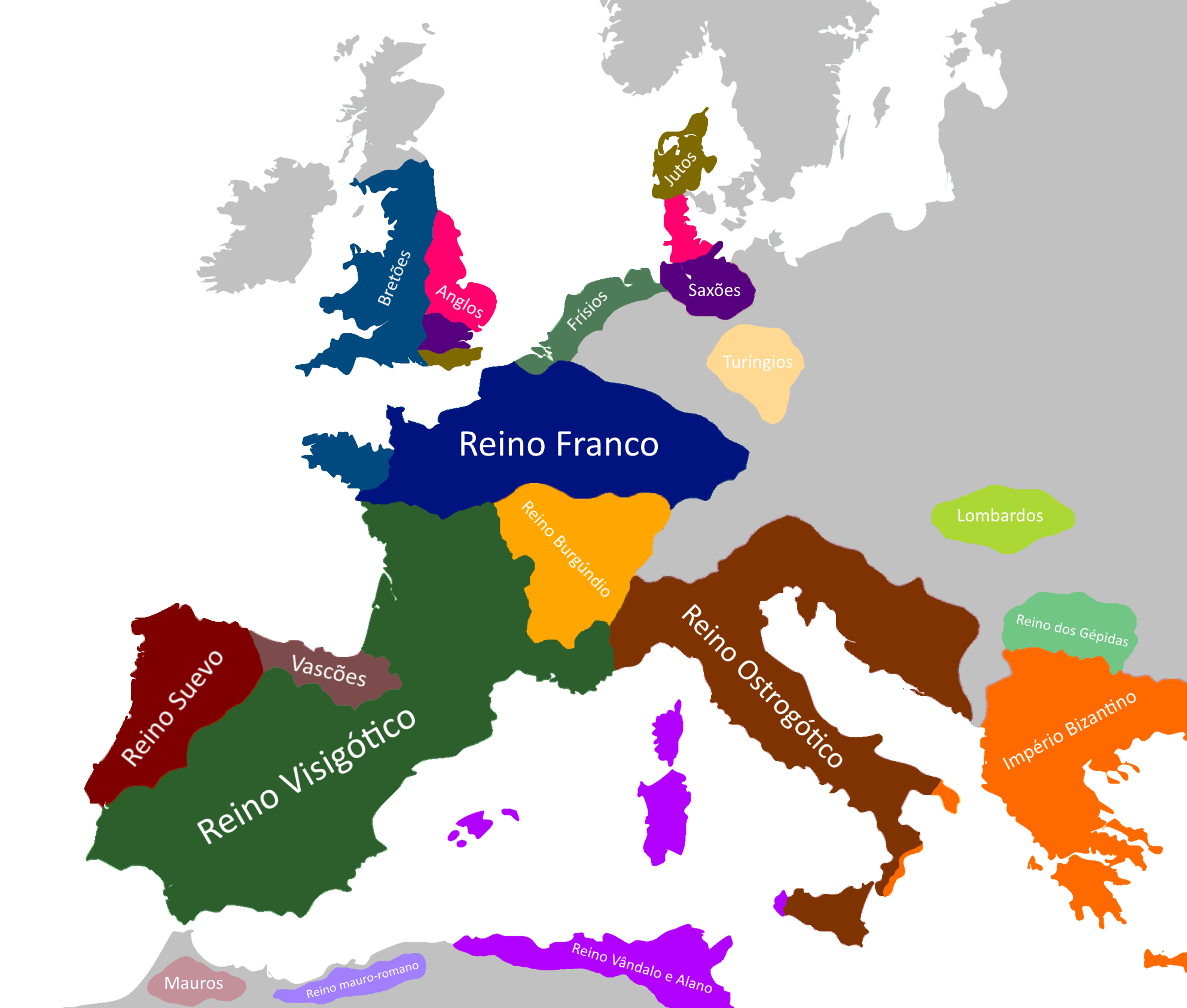 Mapa do continente europeu com seus principais reinos e povos por volta do ano 500 (versão com legenda).